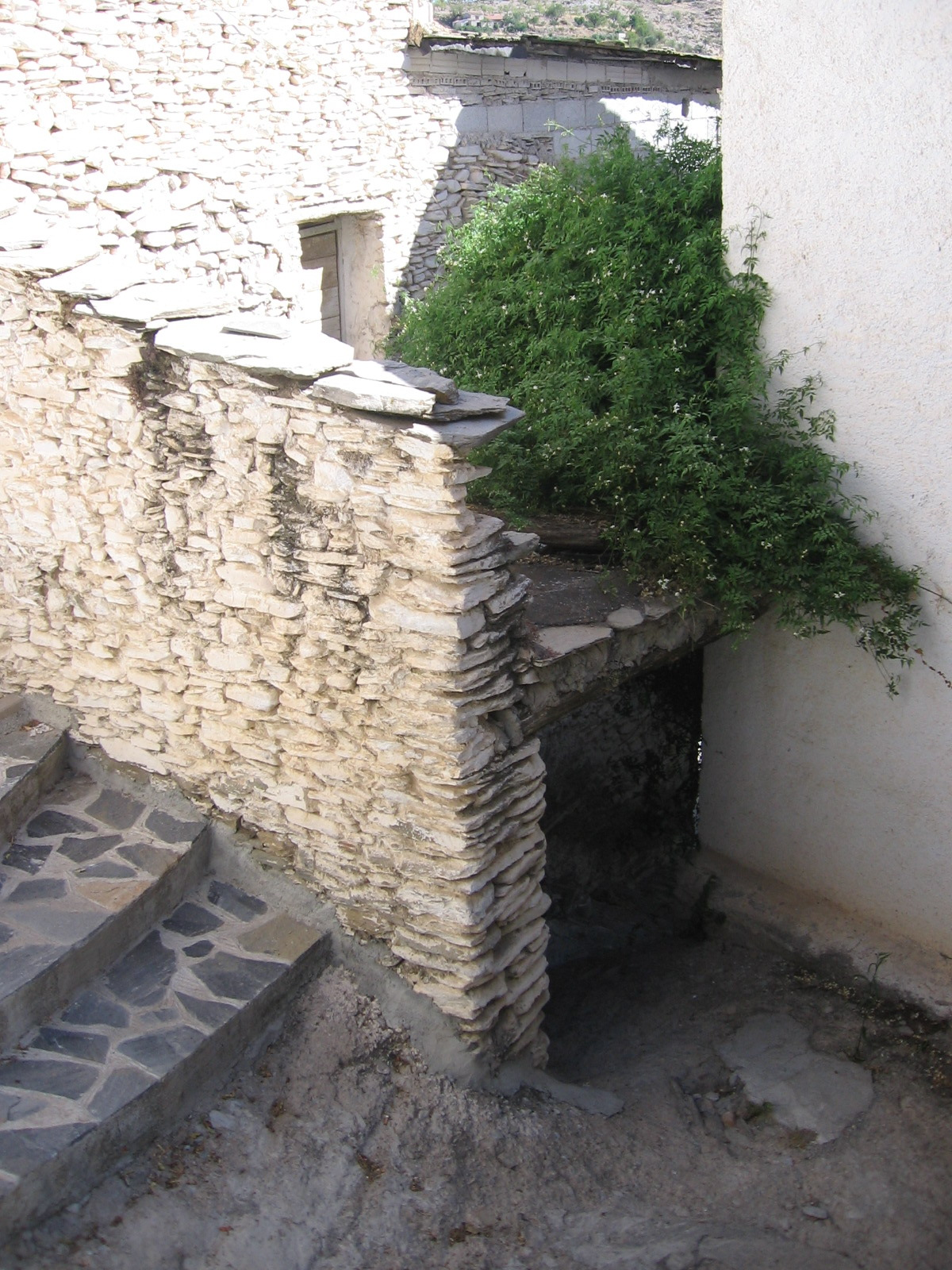 Casa típica, Bacares, España.